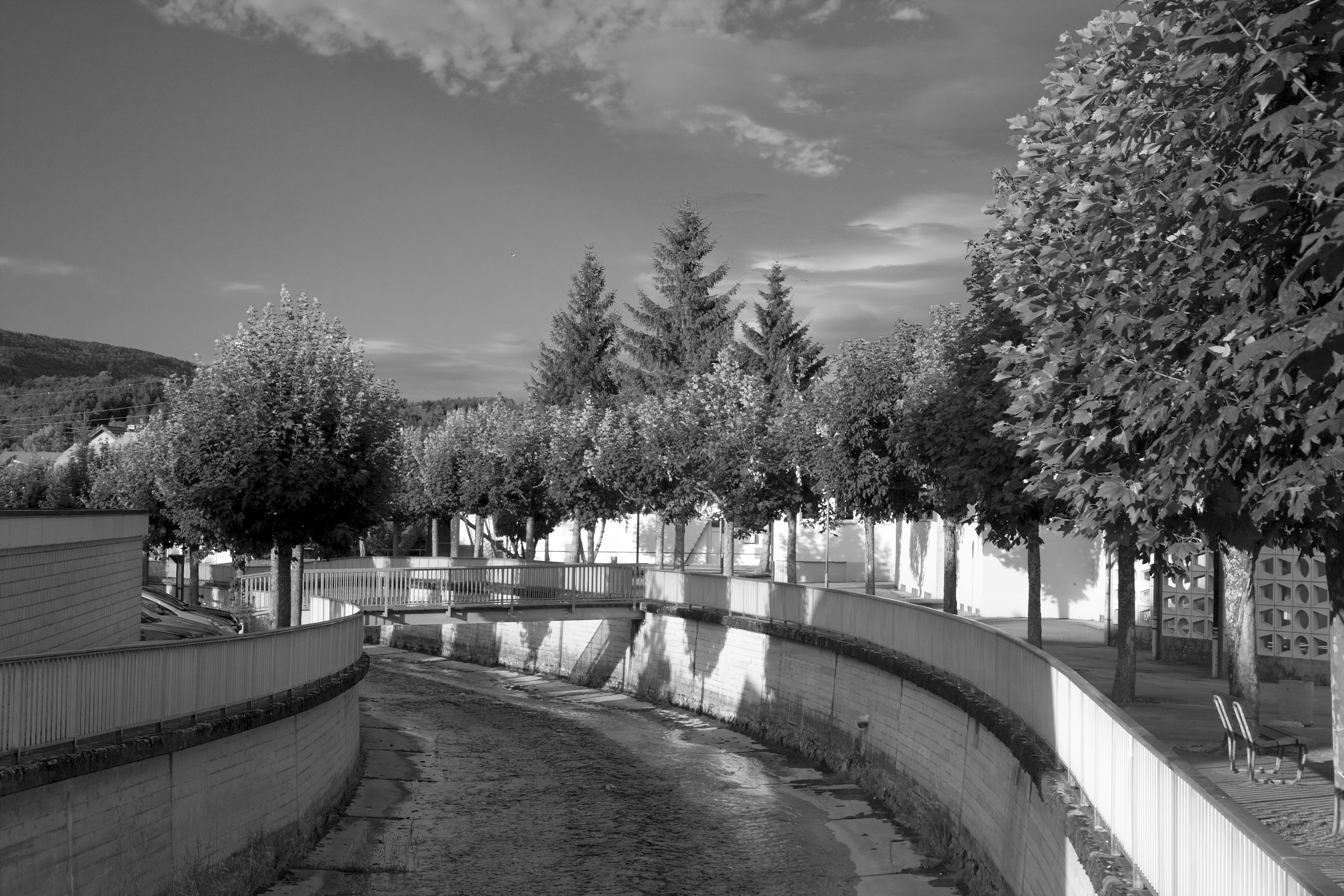 Die Sorne fliesst durch das Zentrum von Bassecourt, eine Allee säumt das Flussufer